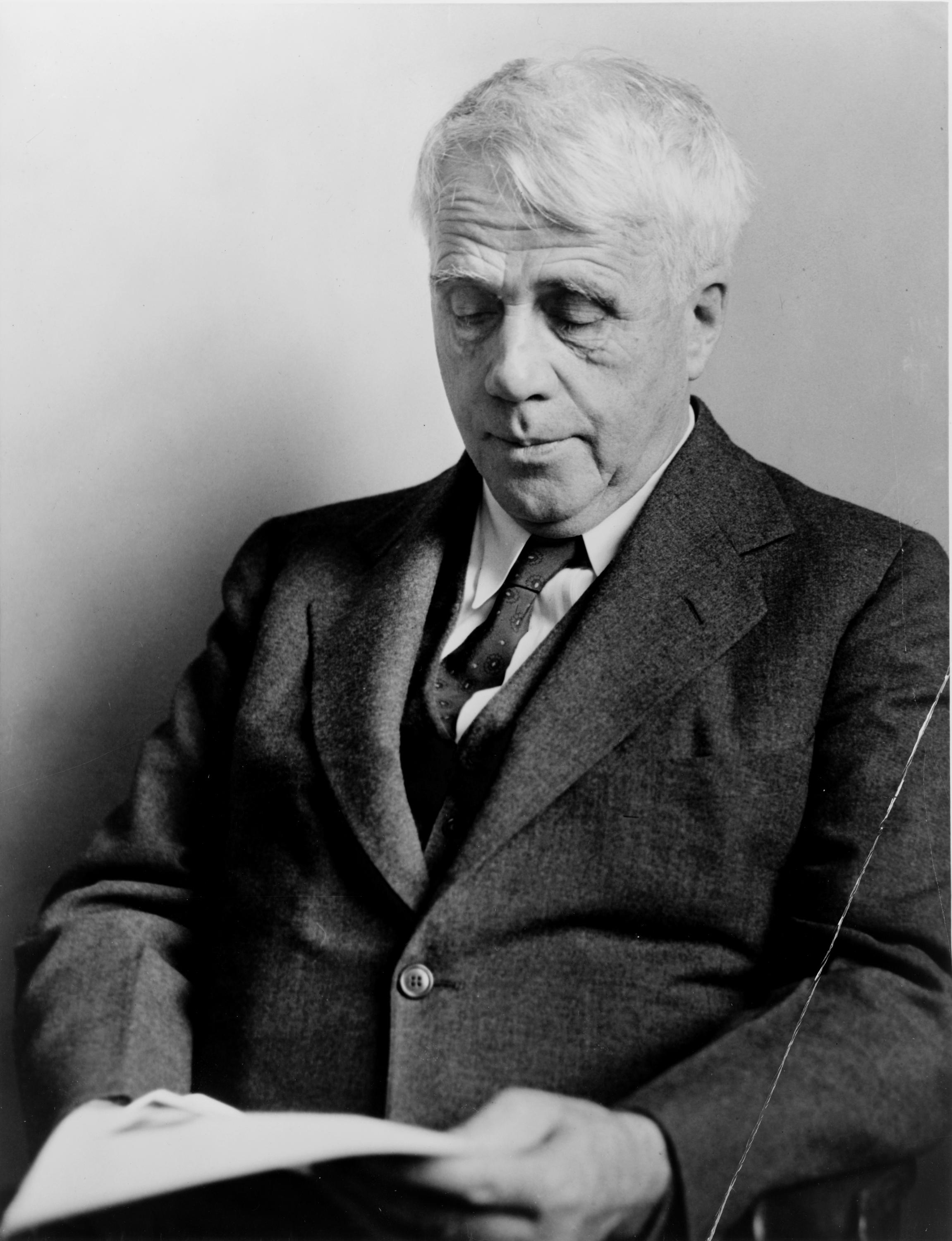 Robert Frost